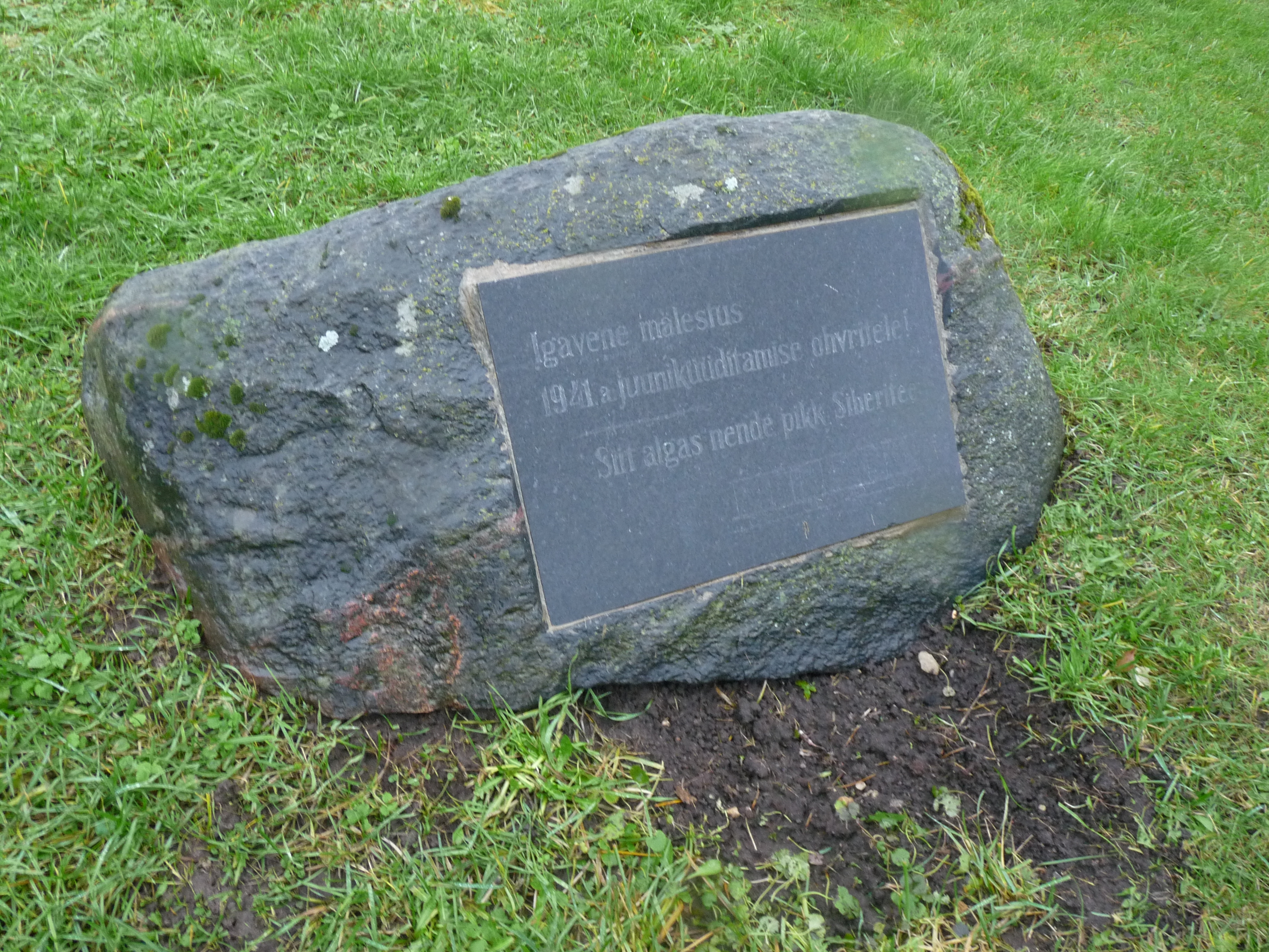 Juuniküüditamise mälestuskivi Jõhvi raudteejaama ees, 4. november 2012